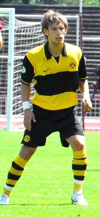 Christian Eggert beim Spiel